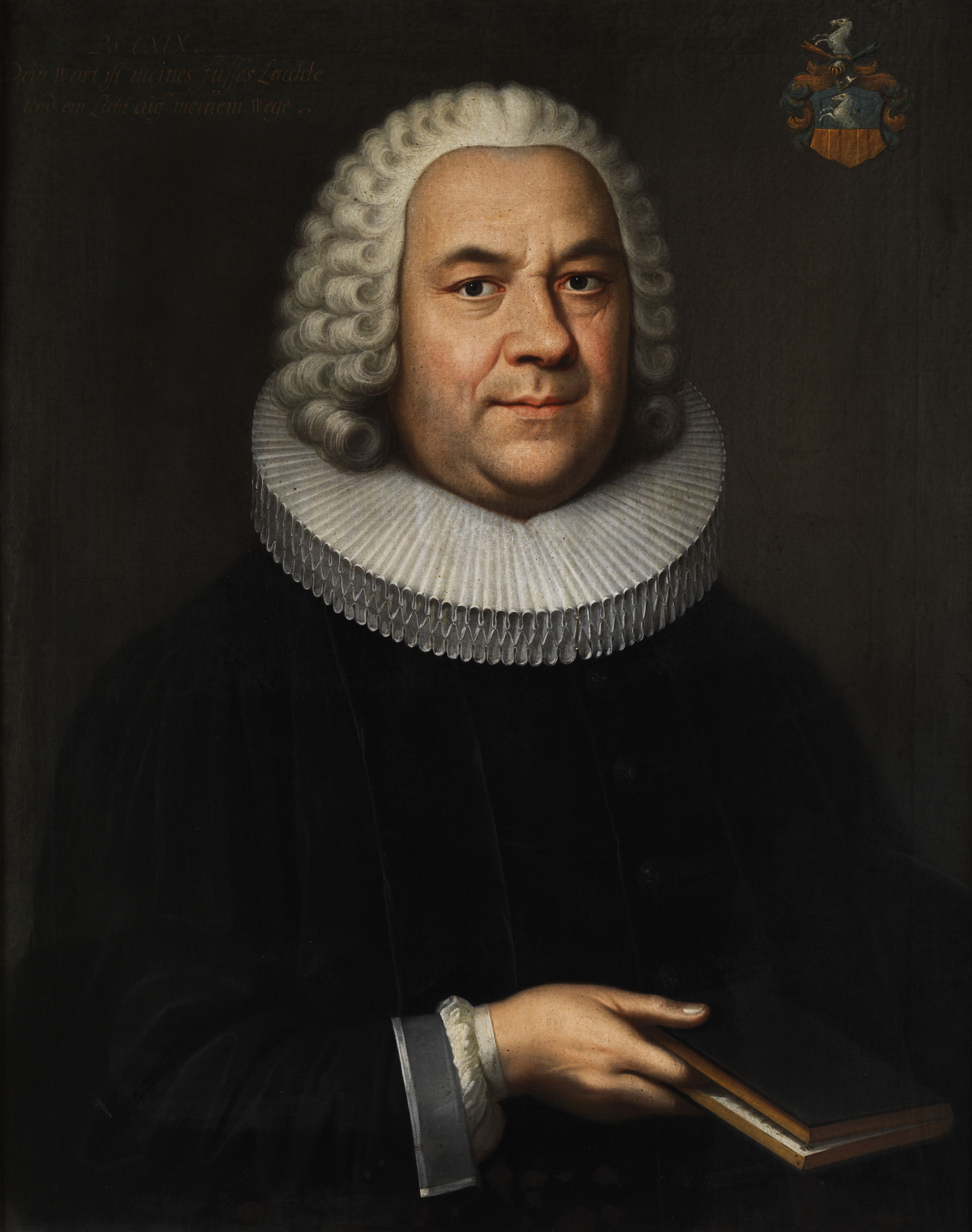 Portrait des Theologen Jeremias Friedrich Reuss (1700–1777), Professor der Theologie in Kopenhagen. Öl auf Leinwand. 76,5 x 61 cm. Links oben Aufschrift aus Psalm 69, rechts oben Wappen.